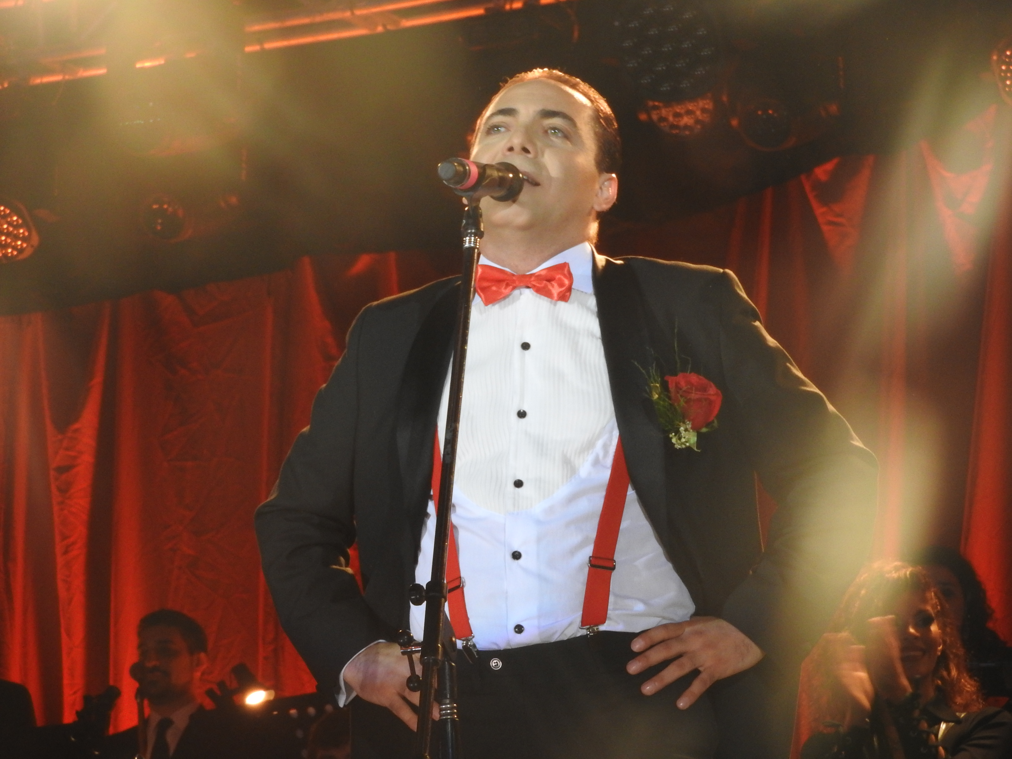 Cantante Mexicano